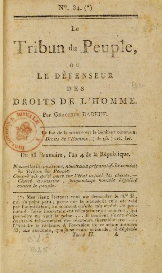 "Le Tribun du Peuple", n° 34, 6 novembre 1795